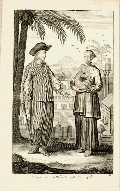 Ein Topasse oder Mardick mit seiner Frau, Mitte des 17. Jhr., von den Reisen Johannes Nieuhofs 1653 bis 1670 nach Südostasiens